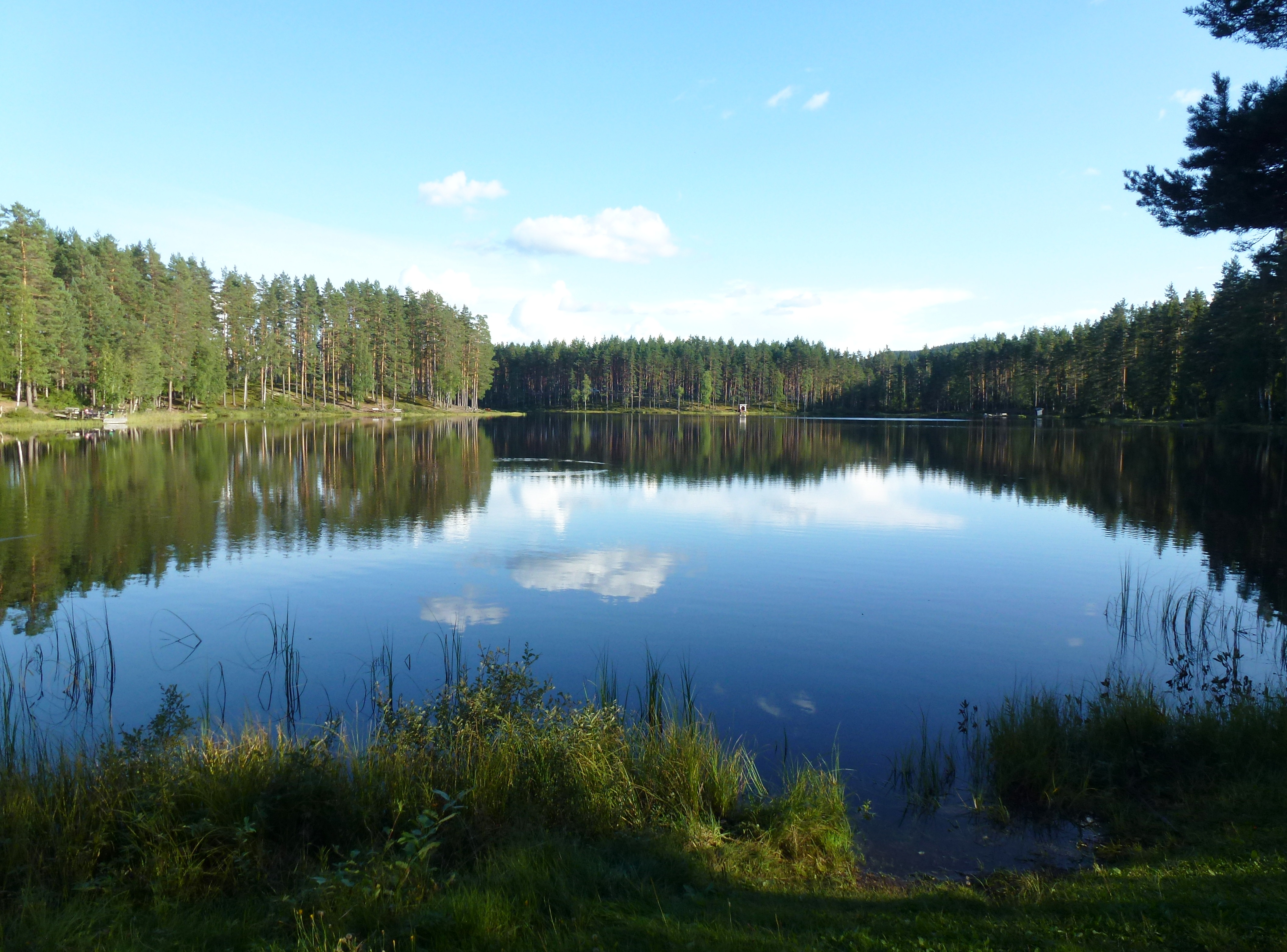 Övre Hedtjärn